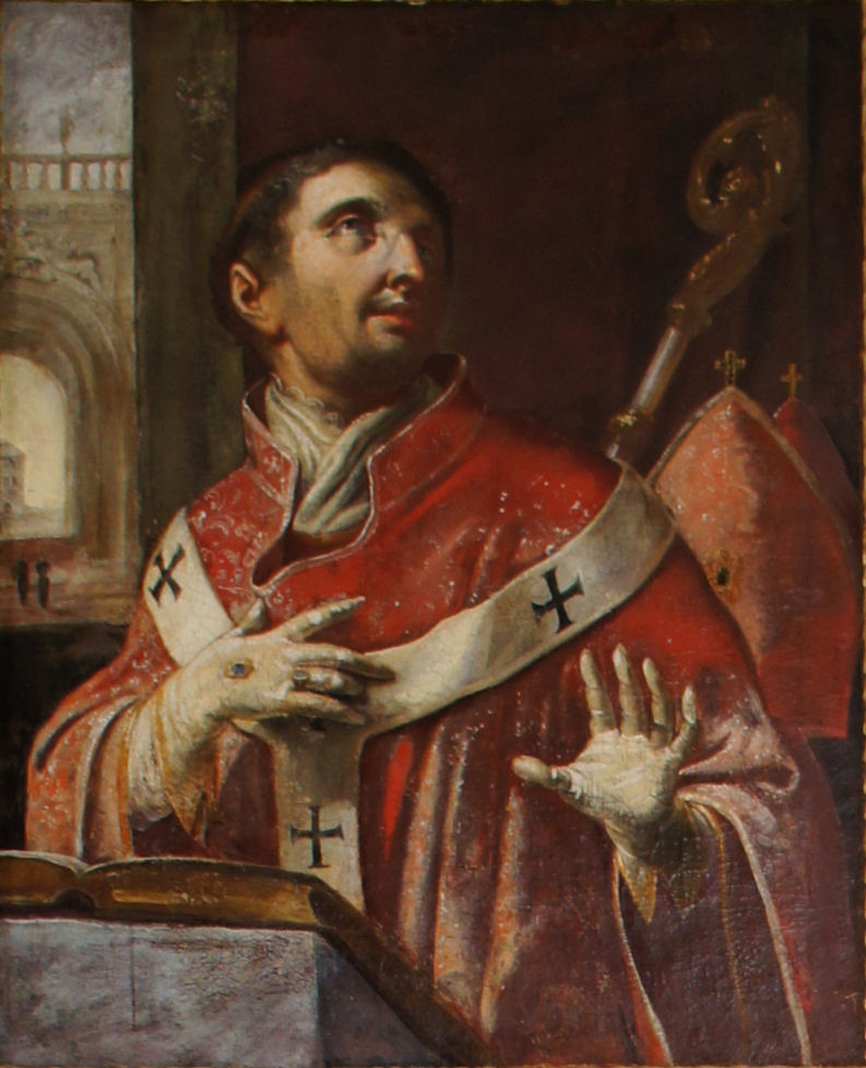 Porträtgemälde von Arnold, Bischof von Freising, im Fürstengang zwischen Fürstbischöflicher Residenz und Freisinger Dom.